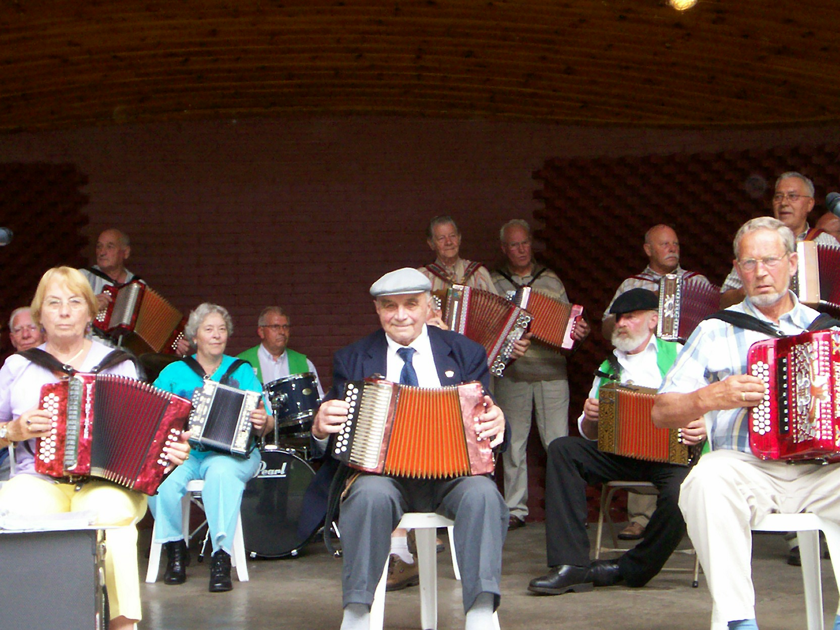 Nedersaksies: Hendrik Sterken speult accordeon.